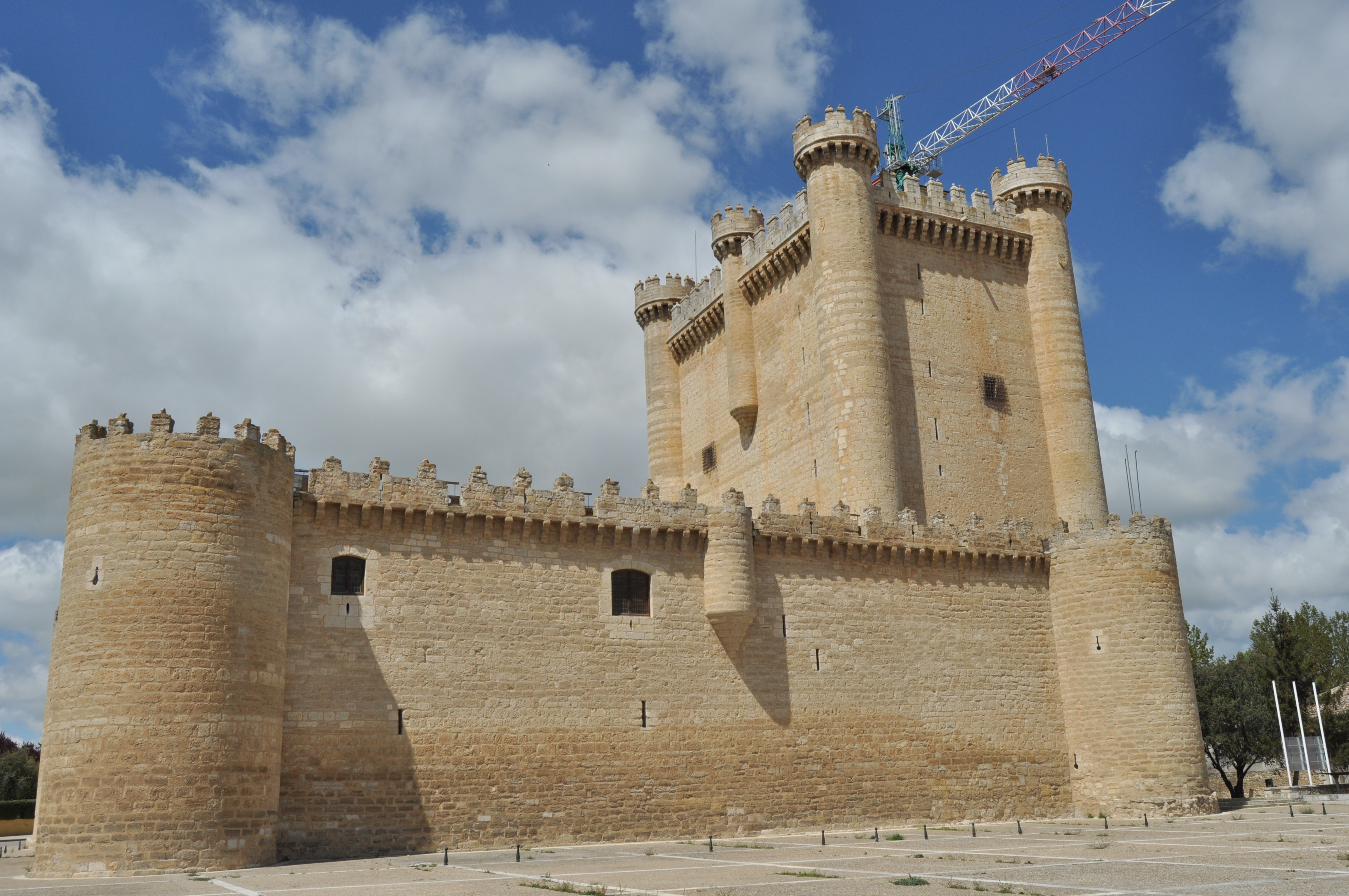 Fuensaldaña - 001